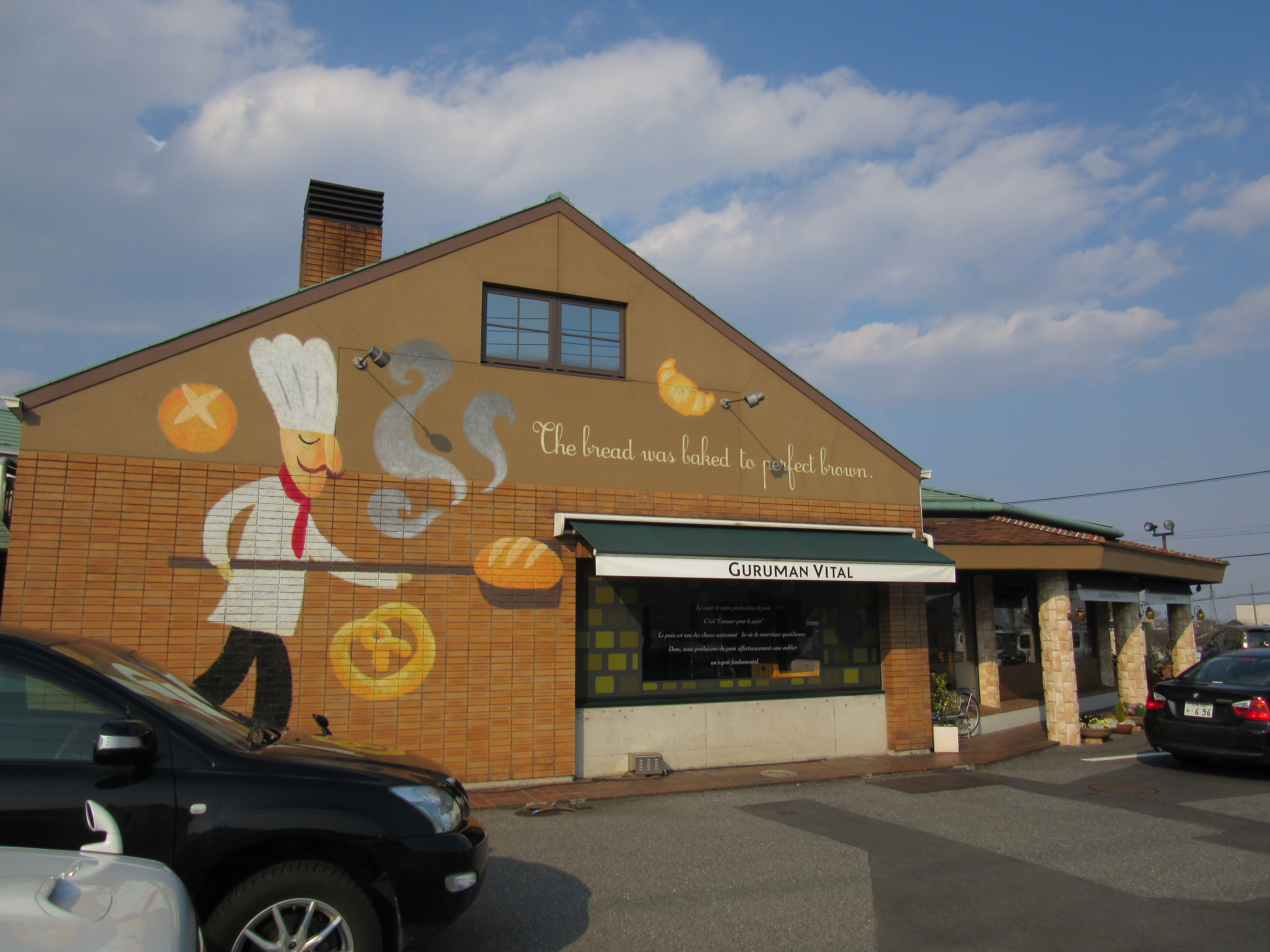 グルマンヴィタル本店